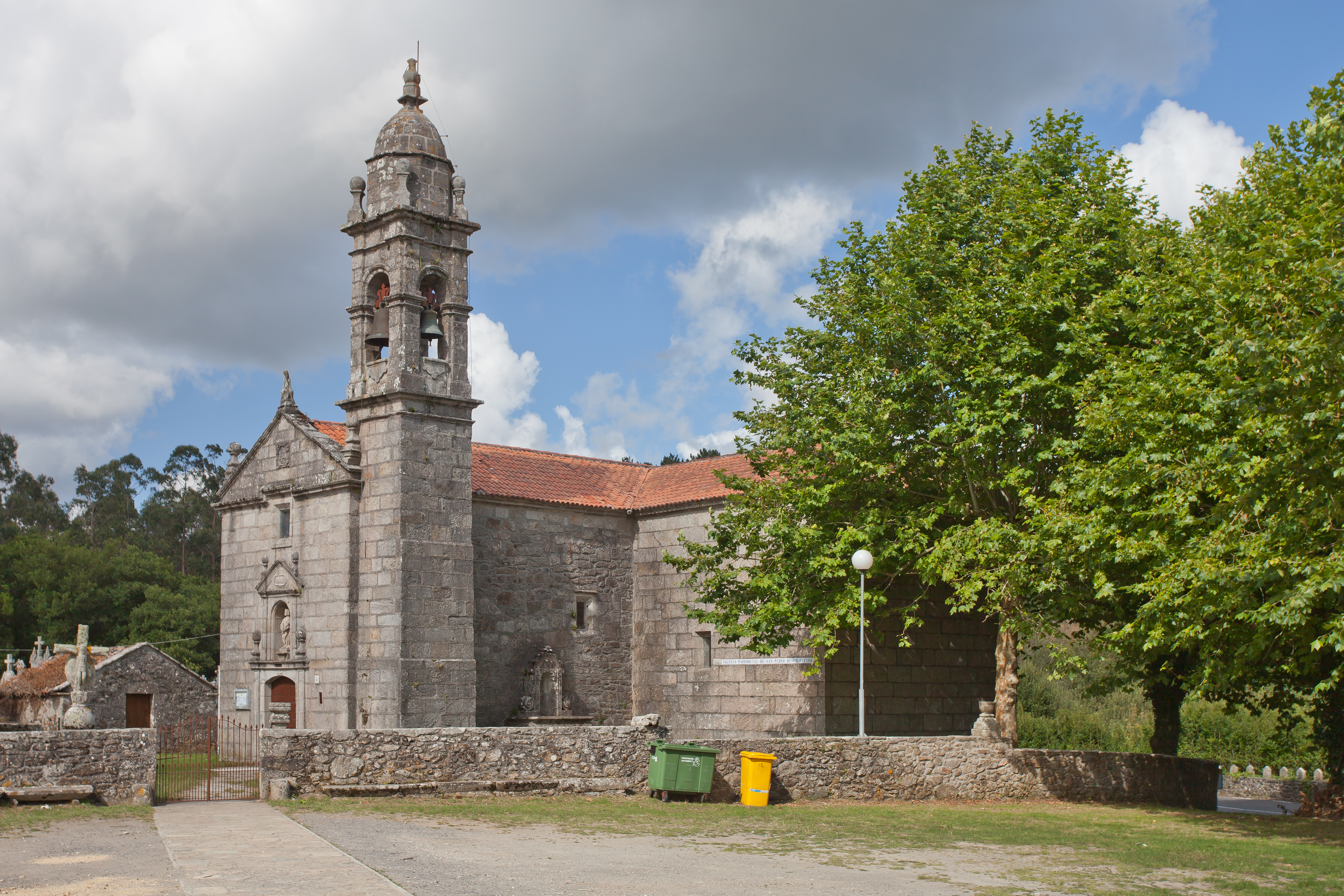 Igrexa de San Pedro de Coucieiro, Muxía, Galiza.